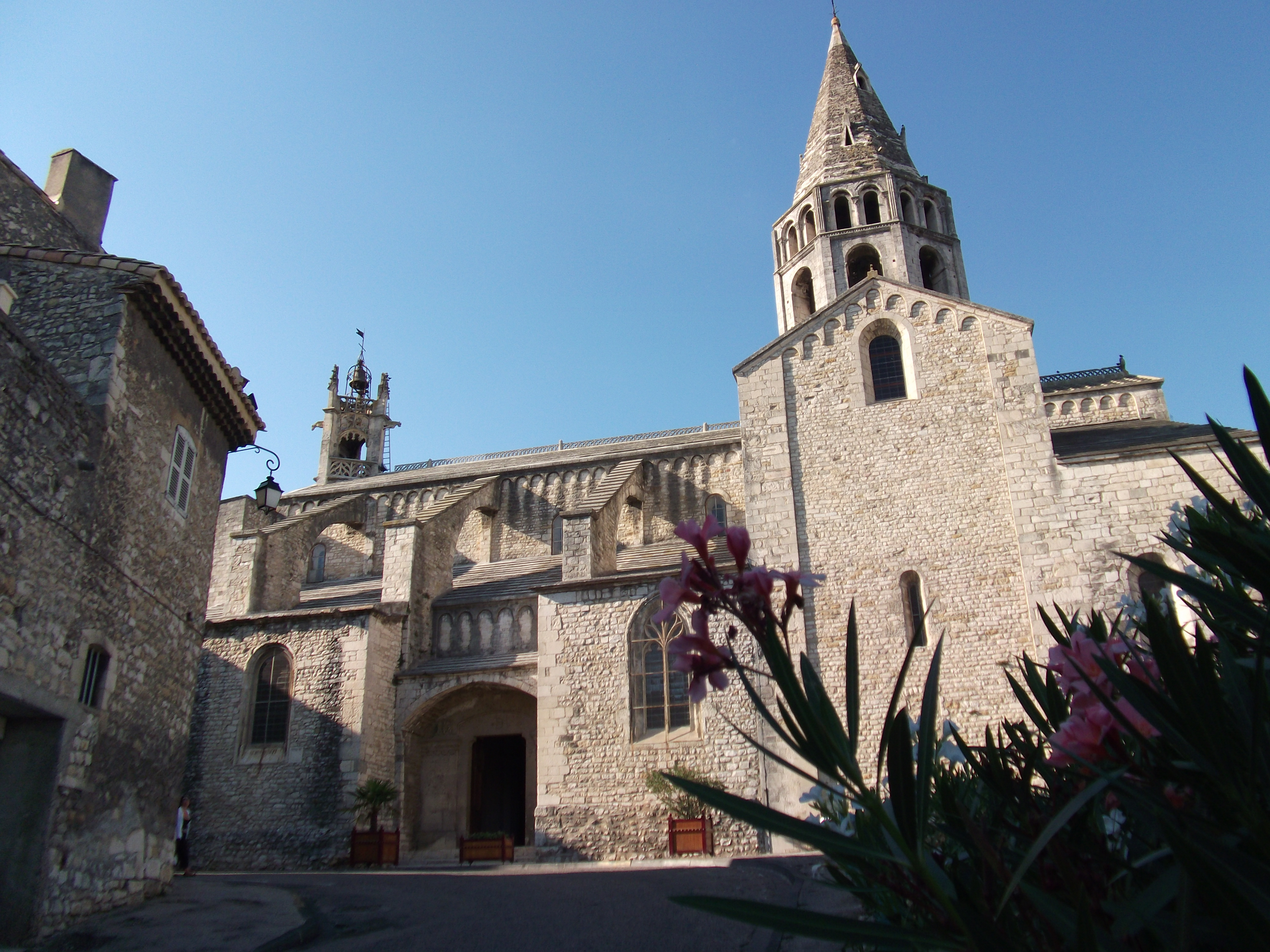 Eglise Saint-Andéol de Bourg-Saint-Andéol en Ardèche - France